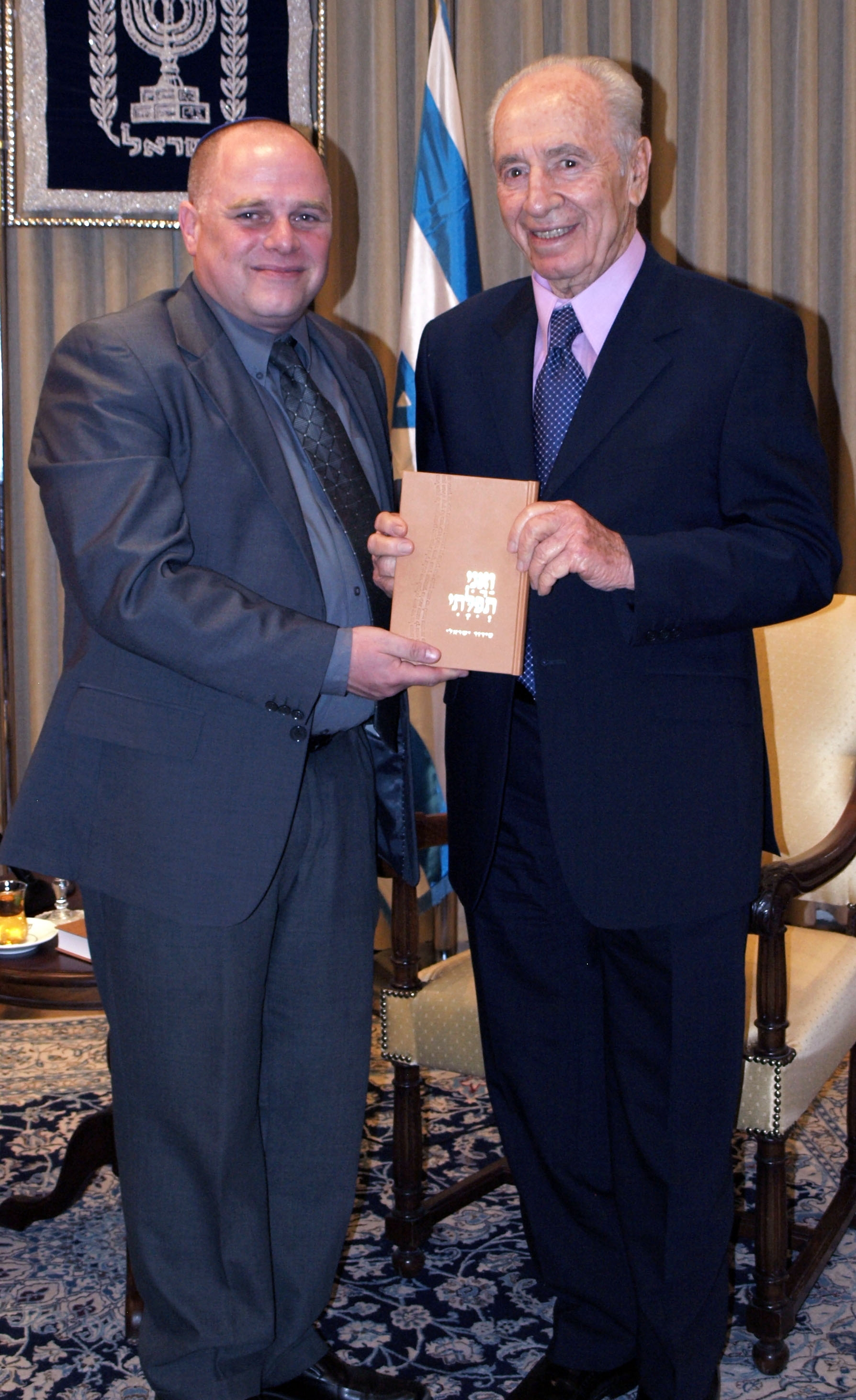 יזהר הס עם נשיא המדינה שמעון פרס